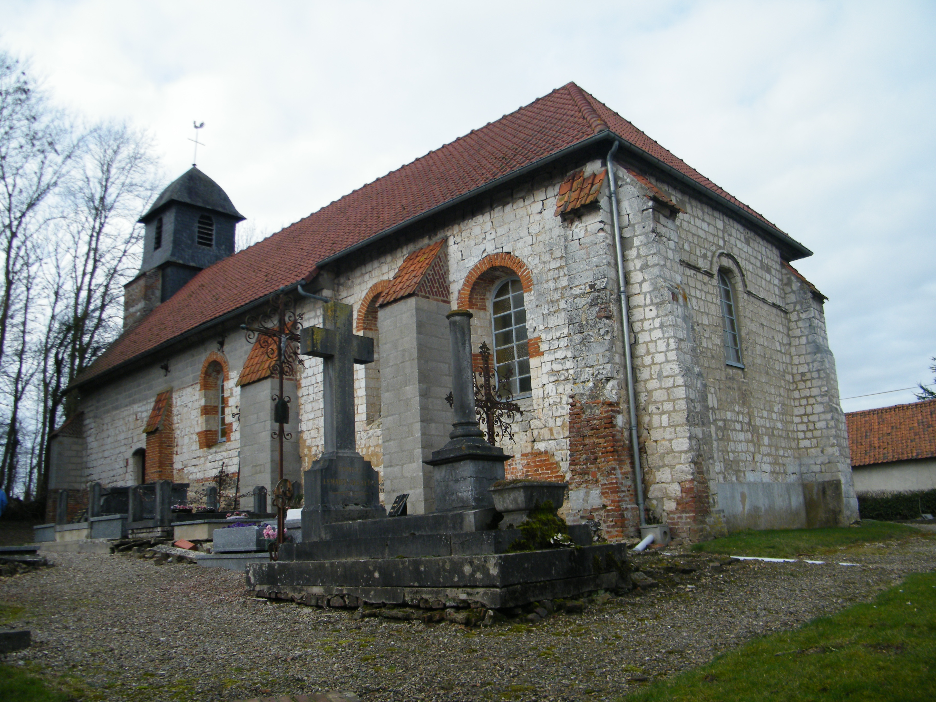 Chapelle Saint-Maclou à Acquet, commune de Neuilly-le-Dien, Somme, Fr.